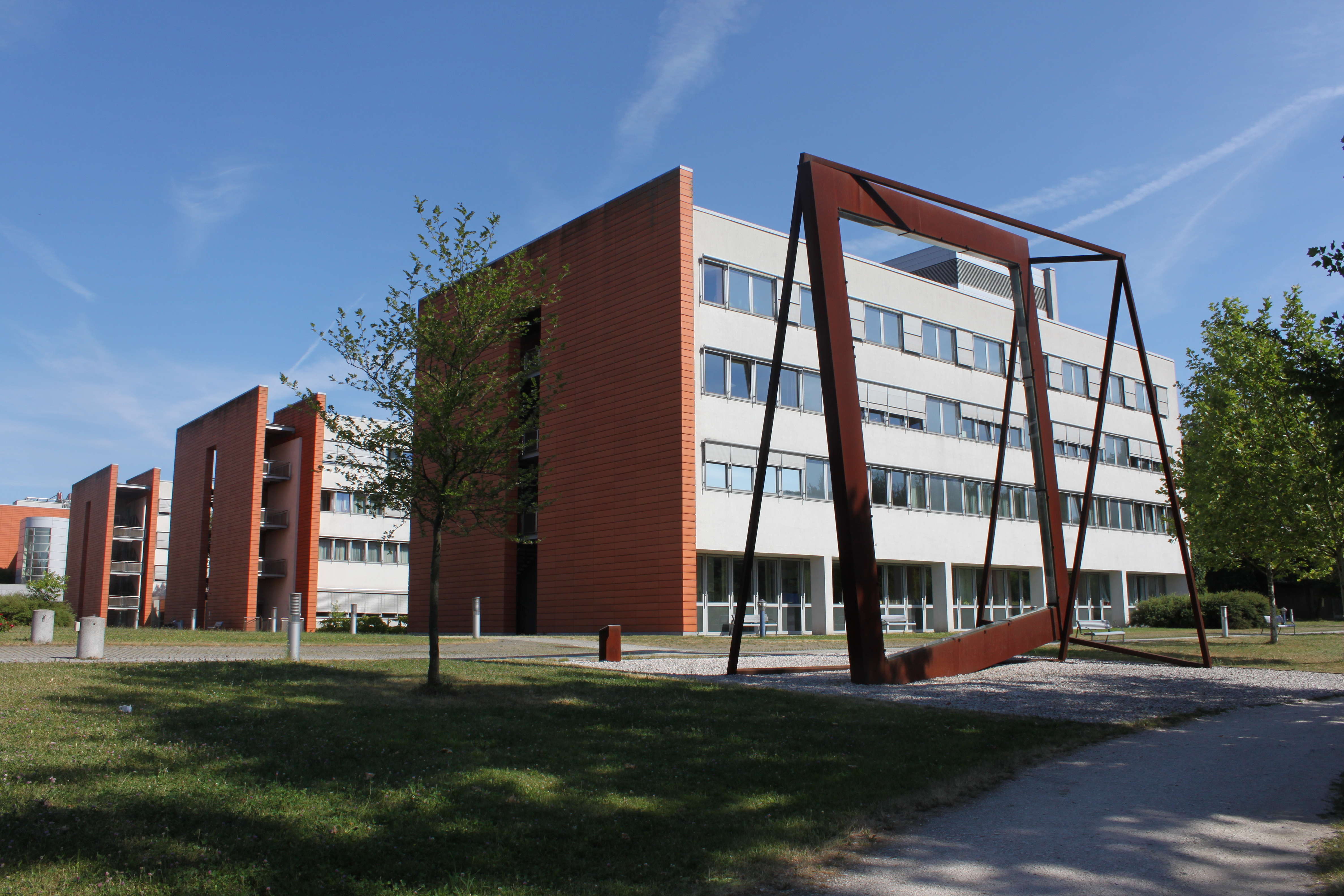 Instabilität Stabilität, beim Haupteingangsbereich der Landes-Nervenklinik Wagner-Jauregg in Linz